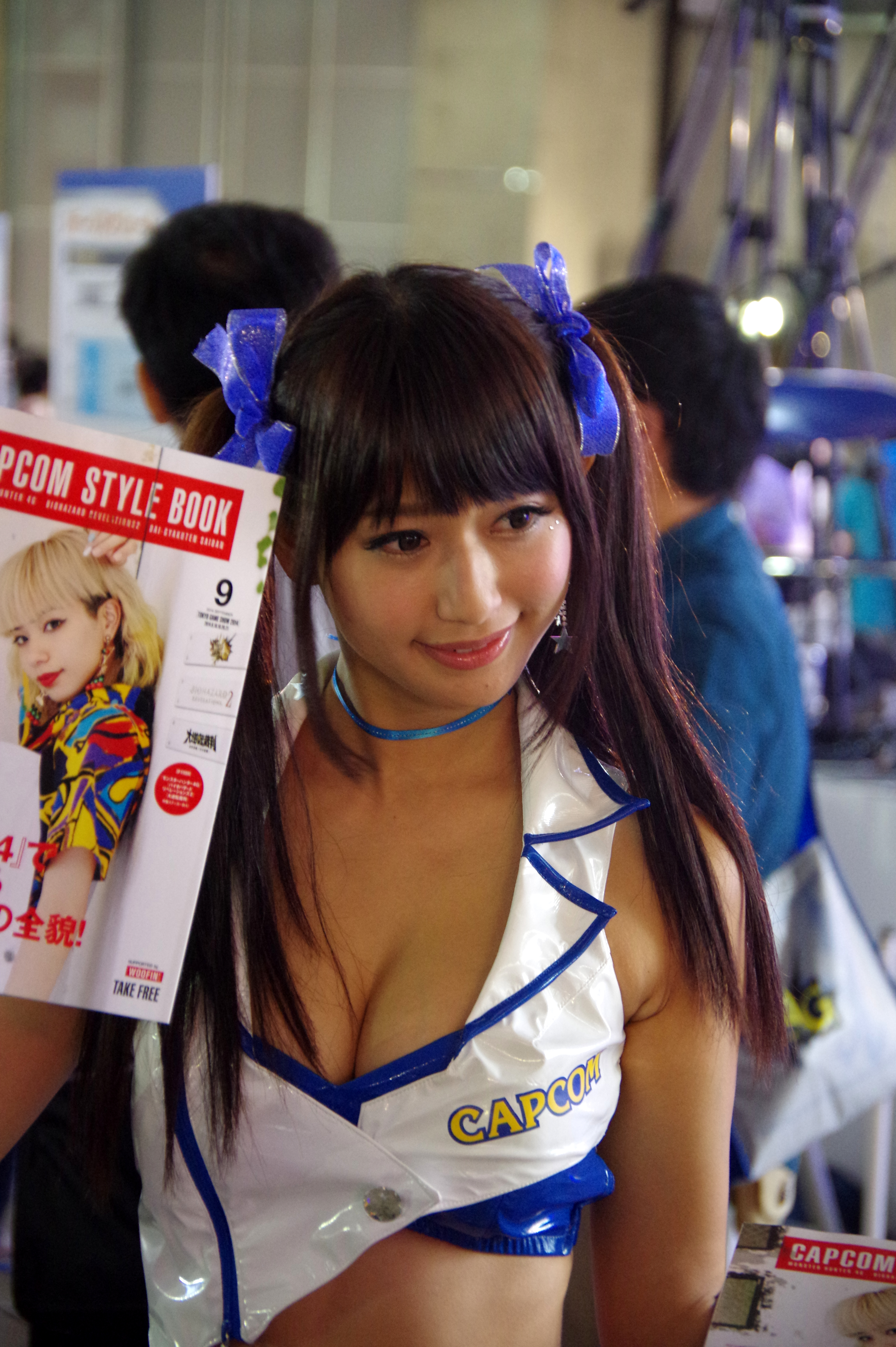 東京ゲームショウ・CAPCOMブース 日野礼香